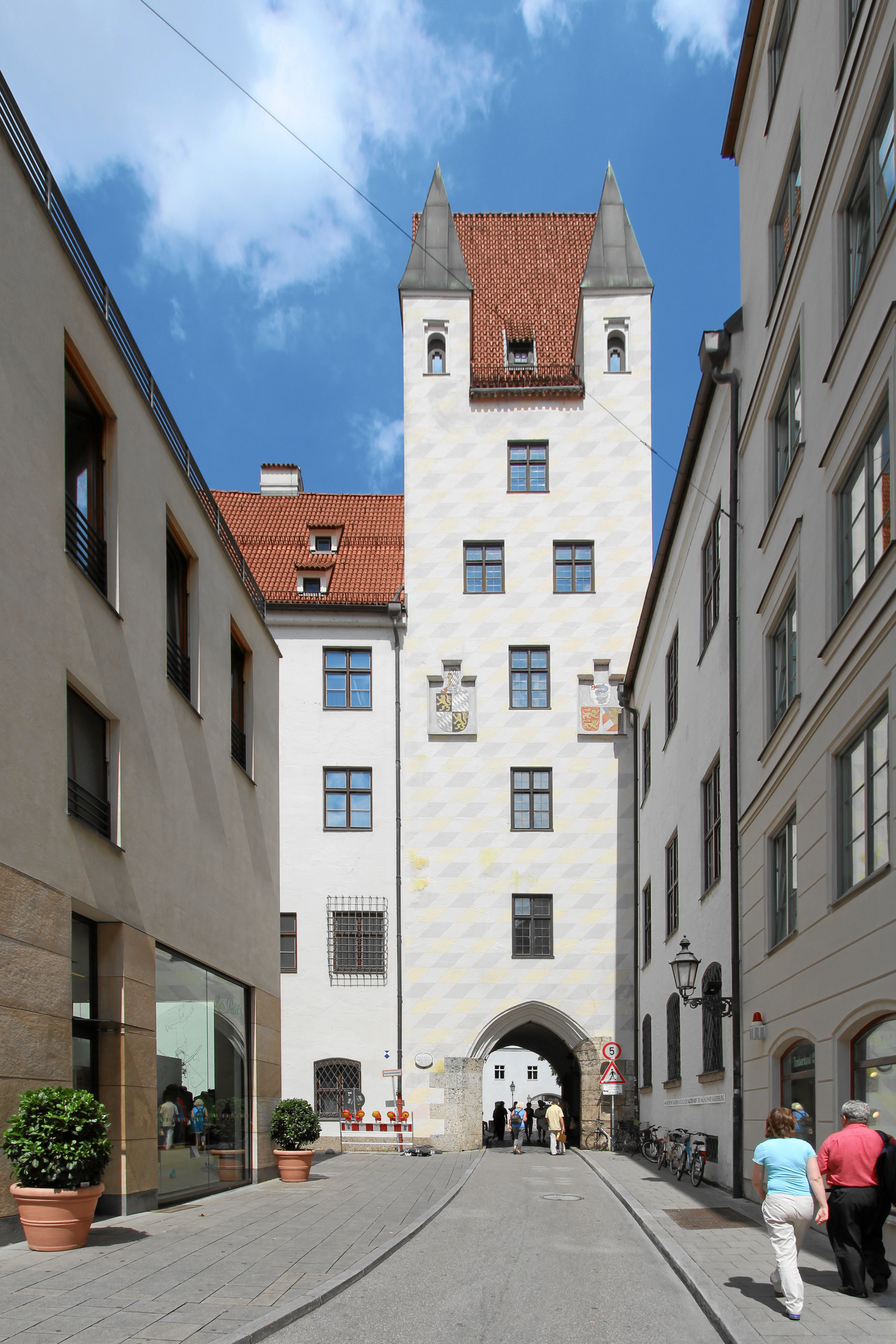 Außenseite des Alten Hofs, 2014